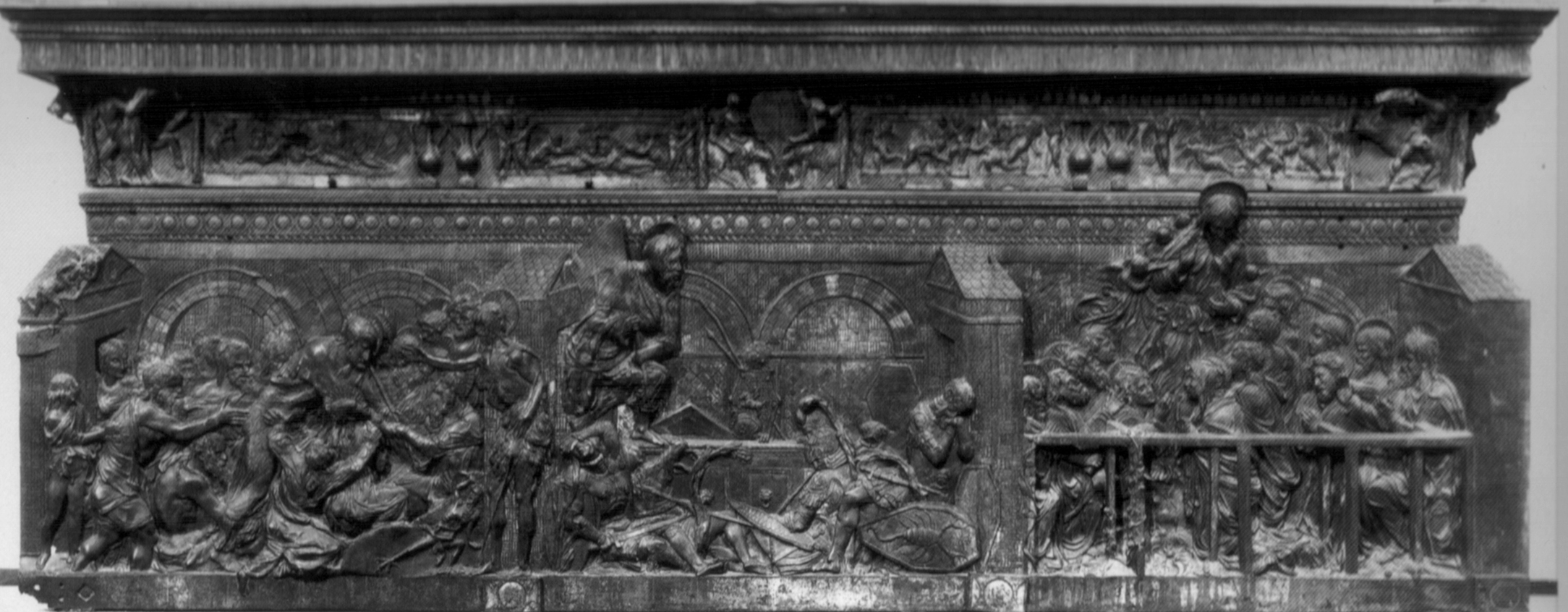 Il Pulpito della Resurrezione, in San Lorenzo a Firenze, opera di Donatello (1460s). Dettaglio: Discesa al Limbo, Resurrezione, Ascensione. - Fotografia Alinari, 1852.